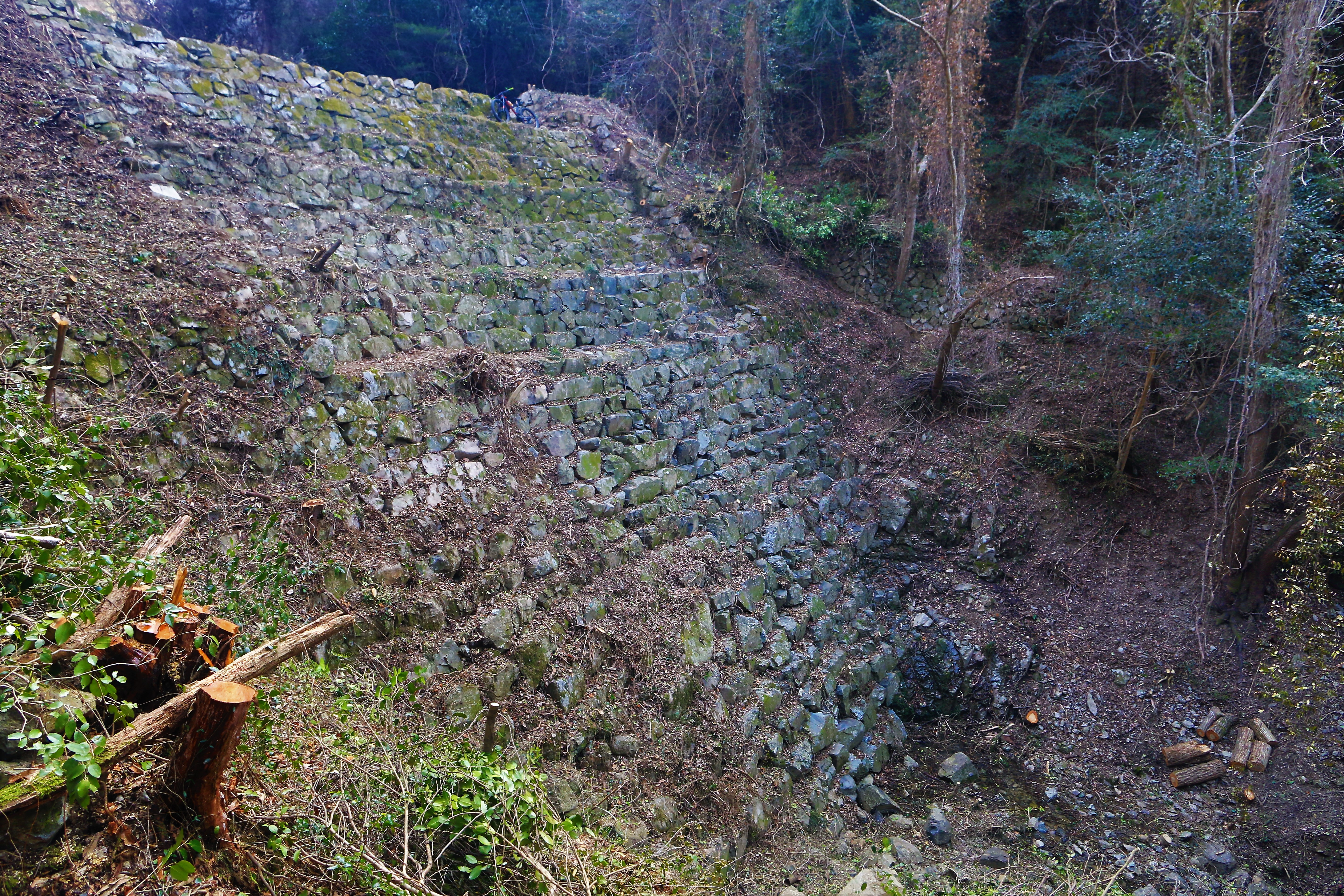 広島県福山市芦田町の第4大谷砂留。左側からの眺め。上段に比較対象のためにMTB自転車を配置した。